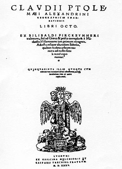 Claudii Ptolomei alexandrini geographicae enerrationeis libri octo